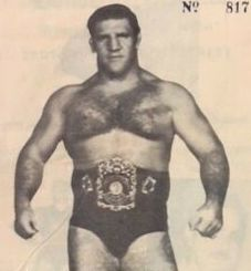 Bruno Sammartino dans un programme de catch du 25 janvier 1975